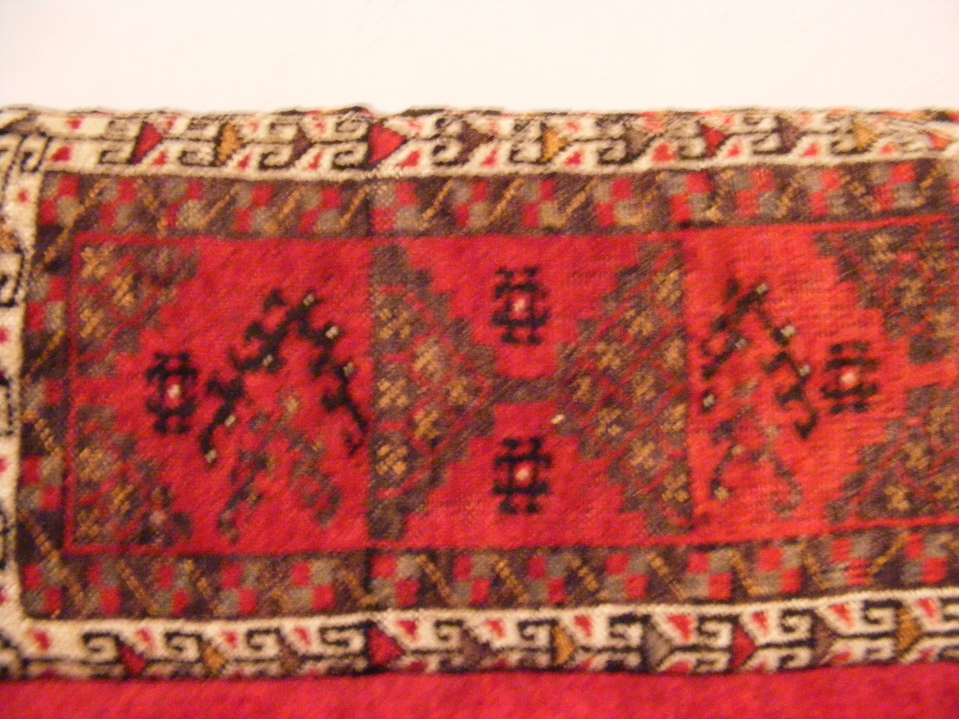 مسند سجاد الفيكة، قطعة أثاث من بلدة الفيكة لبنان